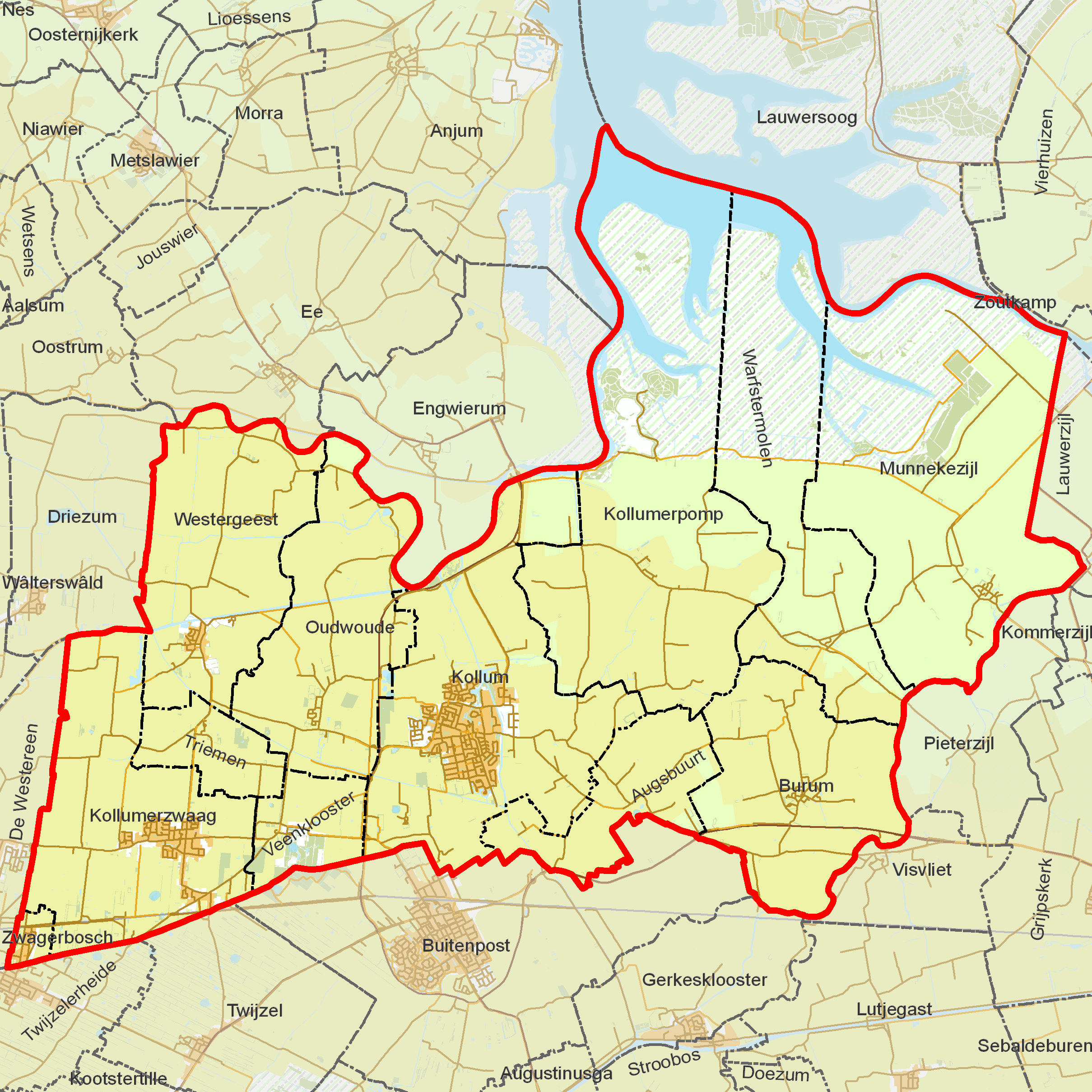 BAG woonplaatsen - Gemeente Kollumerland c.a. Kaart van de BAG-woonplaatsen in de gemeente Kollumerland en Nieuwkruisland (Kollumerlân en Nijkrúslân), die tot 31 december 2018 bestond (per 1 januari 2019 opgegaan in de nieuwe grotere gemeente 'Noardeast-Fryslân' (Noordoost-Friesland)).